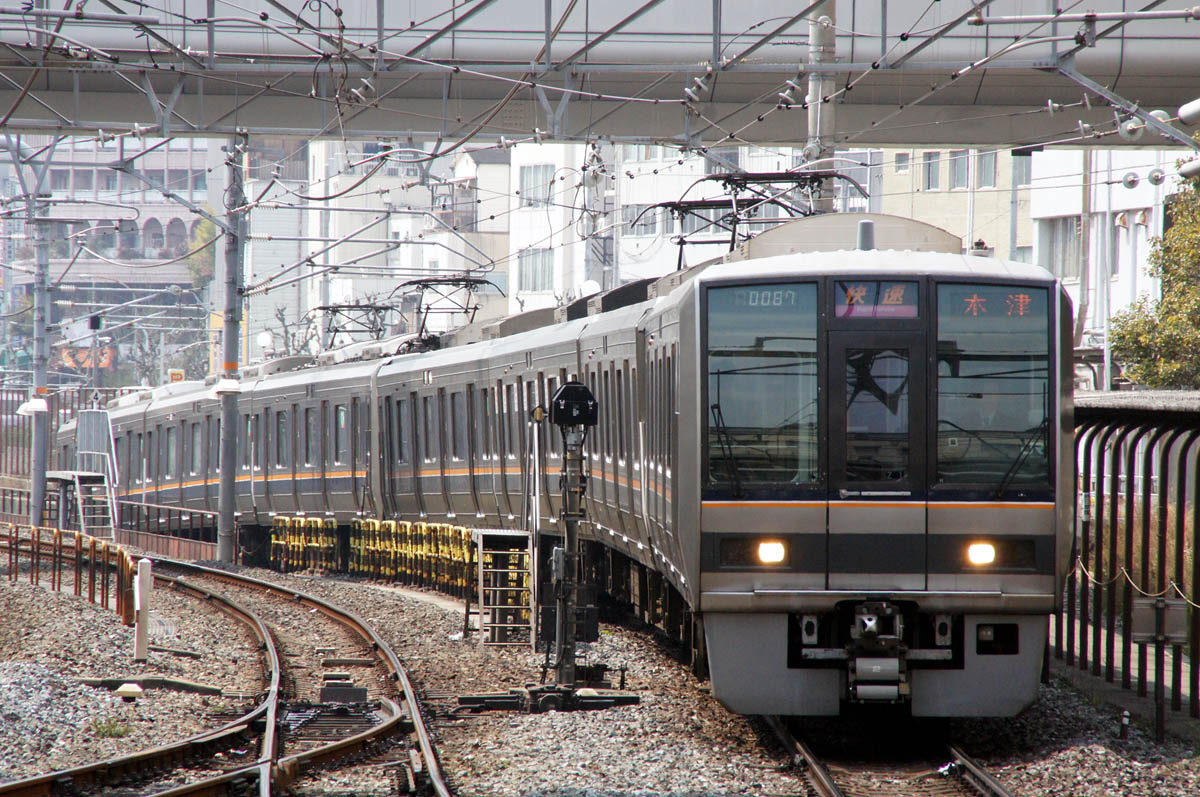 JR西日本207系（JR東西線）